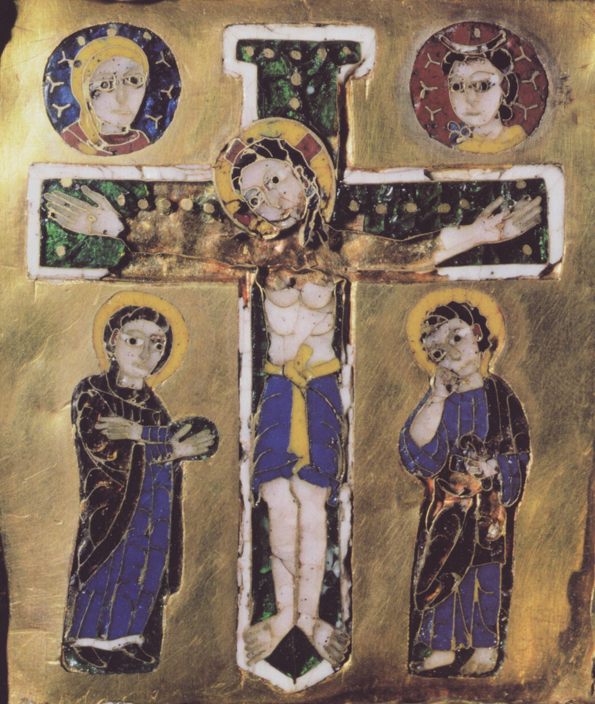 Die Kreuzigungsdarstellung auf dem Kreuz mit den großen Senkschmelzen des Essener Domschatzes, Email in Senkschmelztechnik, entstanden um 1000 (Das Objekt ist zweidimensional.)